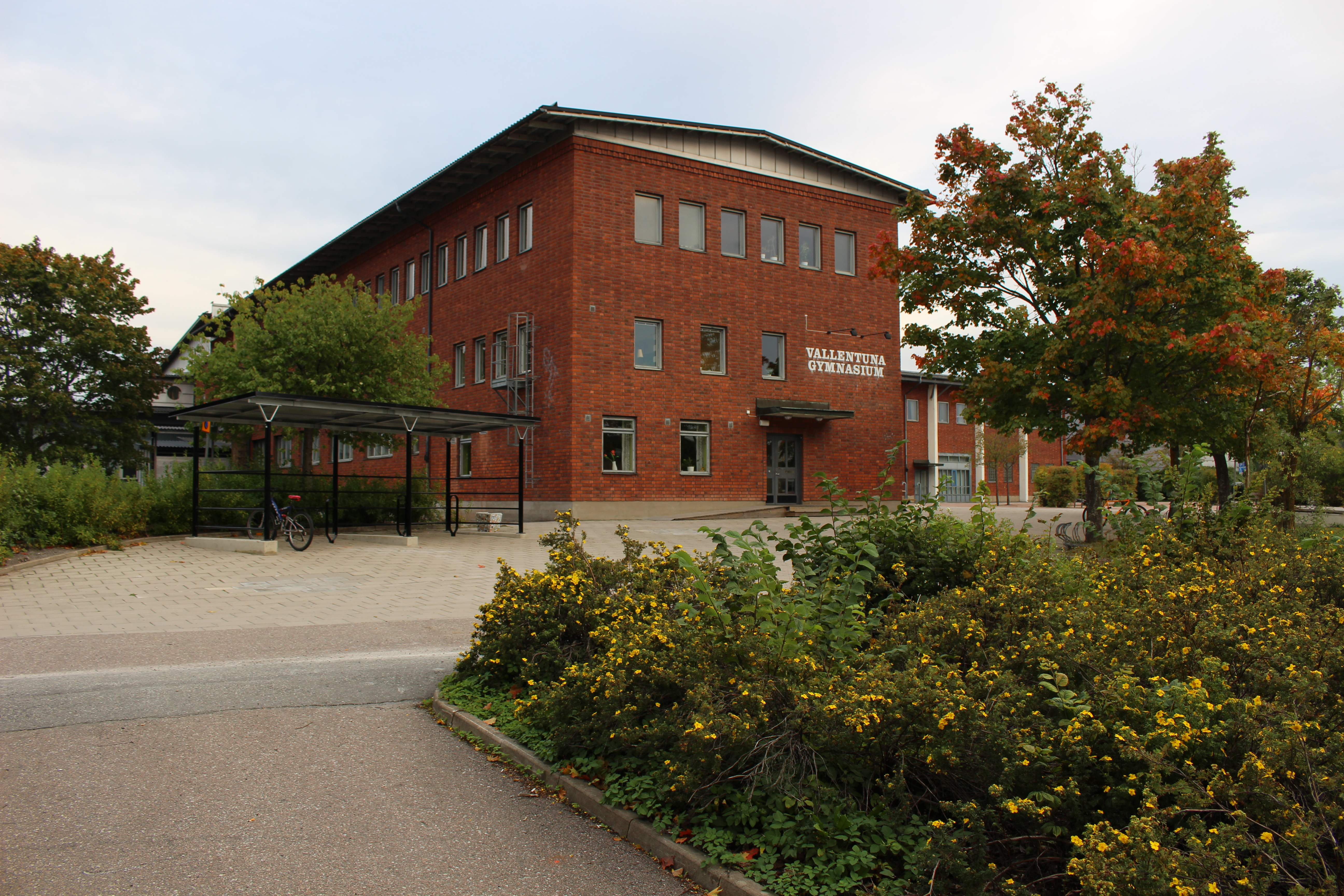 Vallentuna gymnasium från väster.